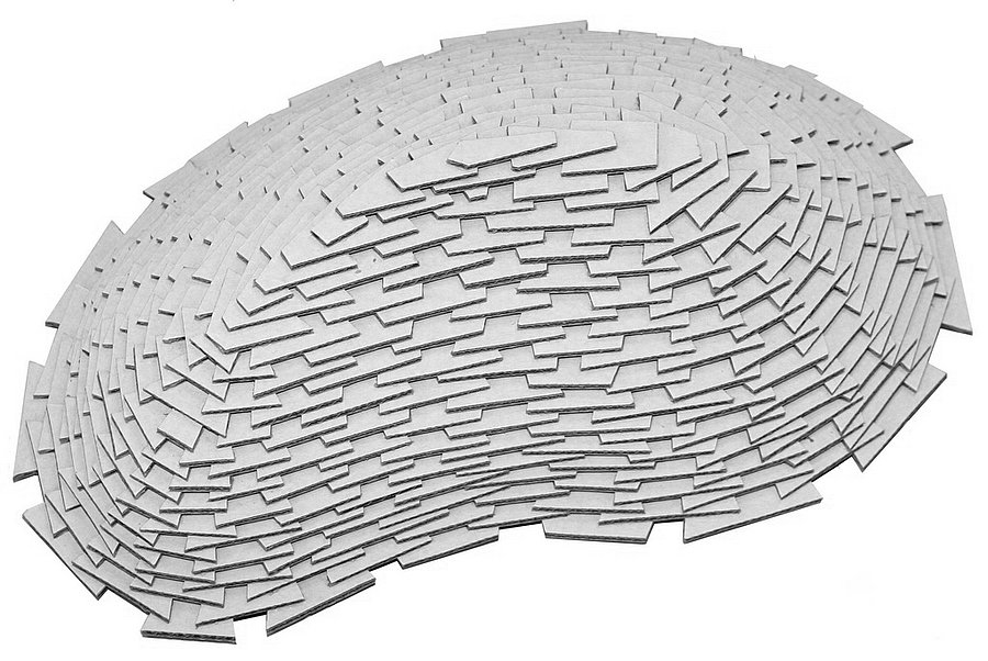 Objekt Lightling II des Künstlers Peter Clouth, fotografiert von Heinz Hachel